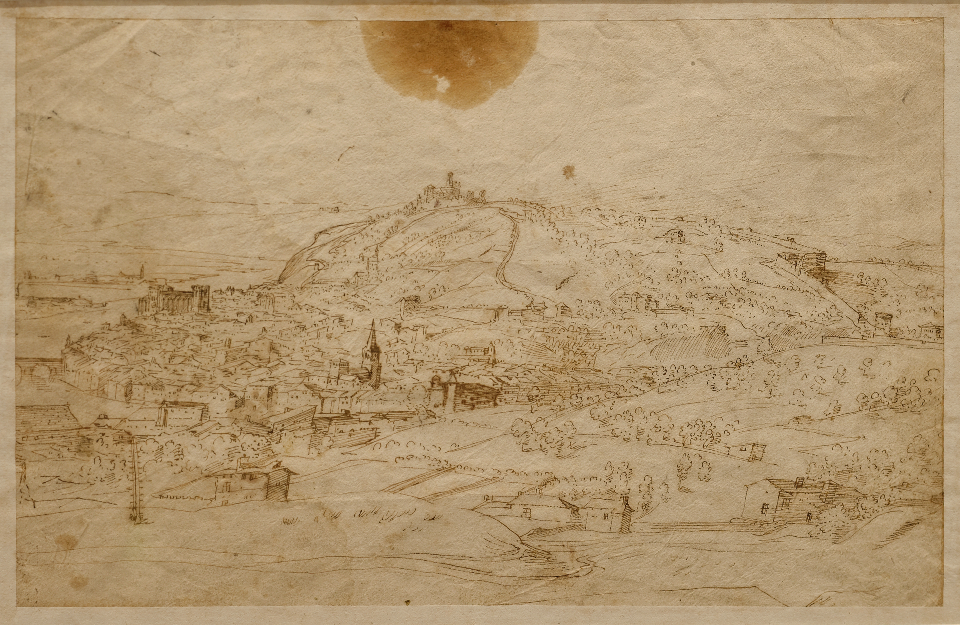 Anonyme Fabriczy [Hendrik Gijsmans (1540-1560 – 1611-1612) ? Lyon vu depuis la colline de la Croix-Rousse. Plume et encre brune Stuttgart, Staatsgalerie